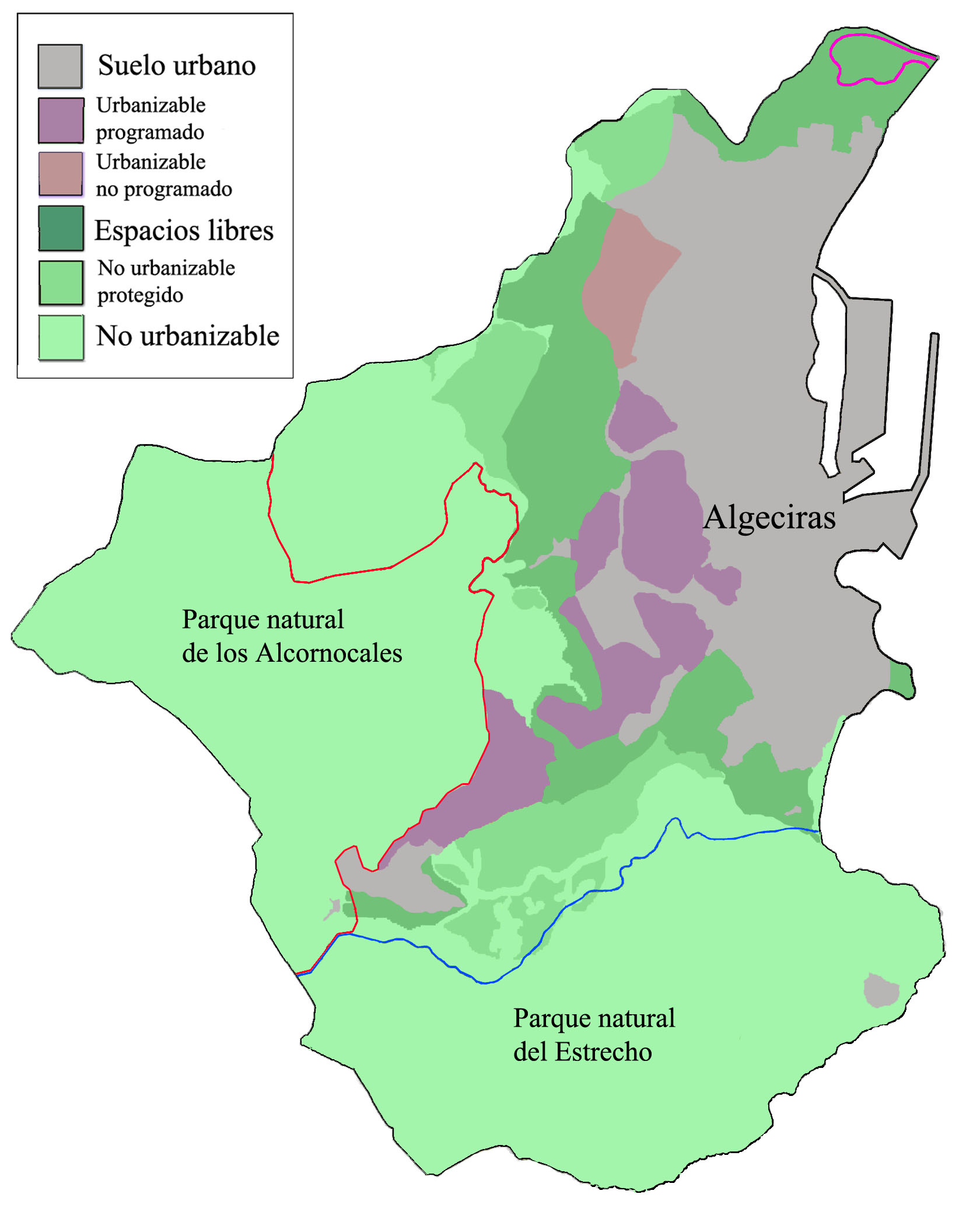 Plano de los usos del sualo programados según el plan general de ordenación urbana de Algeciras, España